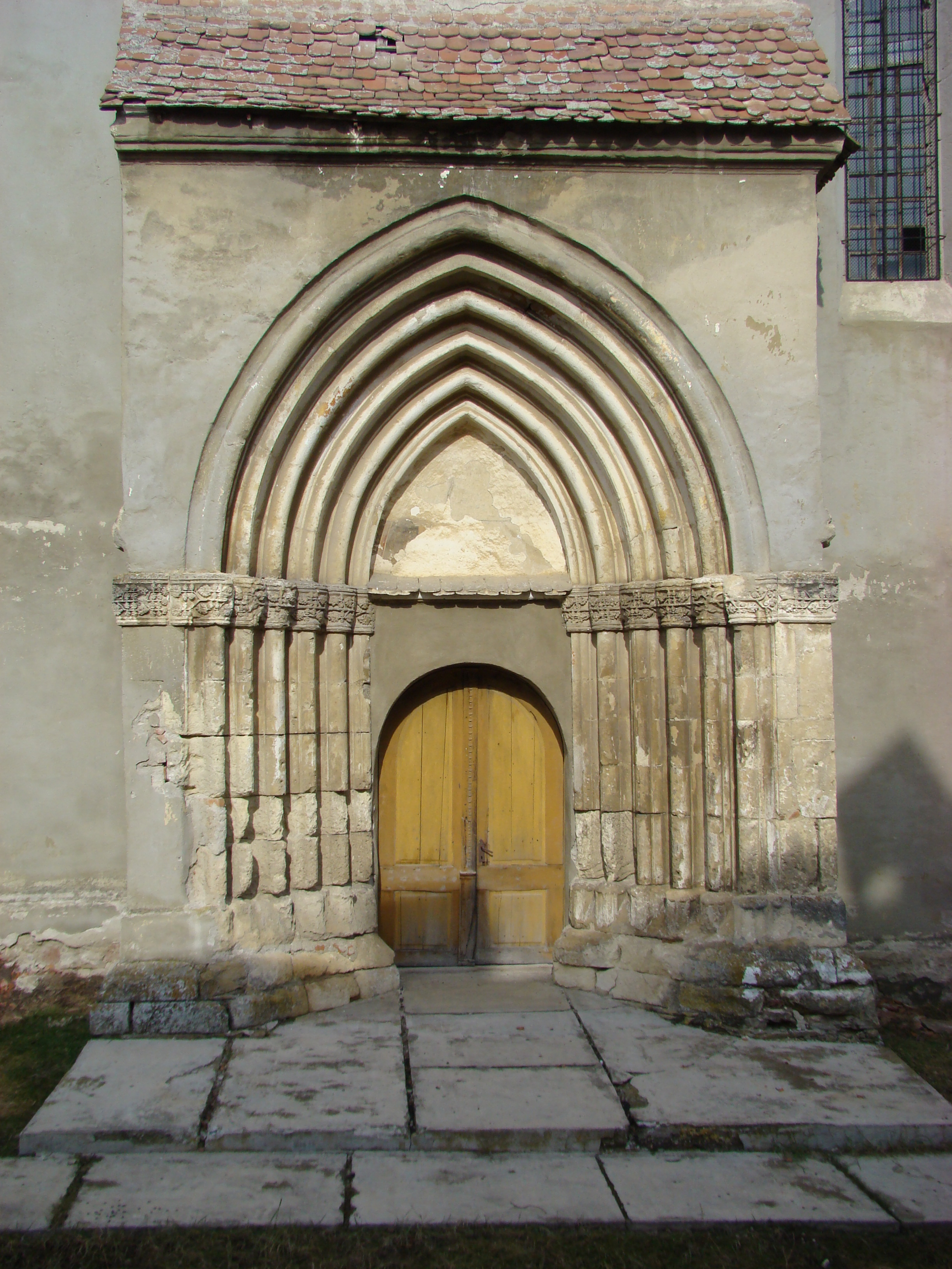 Biserica evanghelică, sat BĂGACIU, județul Mureș 01